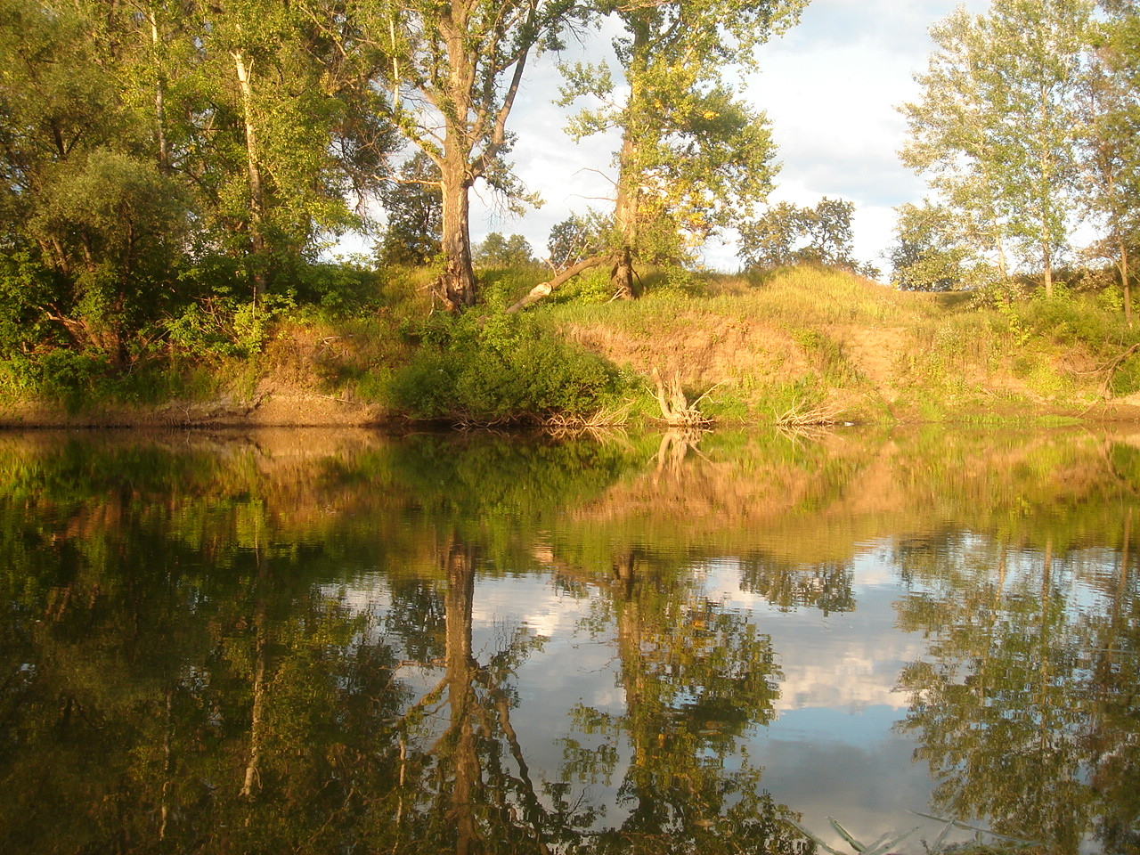 Река Дёма у деревни Бочкаревка